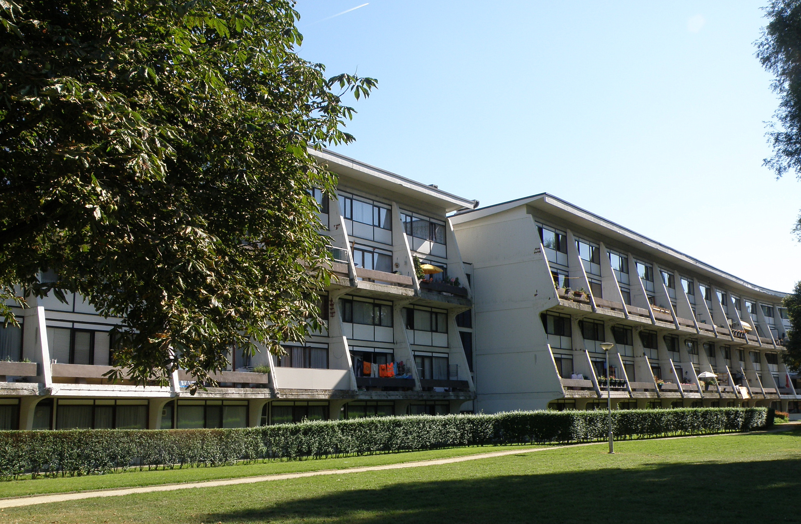 Antwerpen, district Deurne. Arenawijk (Deurne Zuid), woonwijk n.o.v. archit. Renaat Braem en Octave De Koninckx, anno 1960-1964.